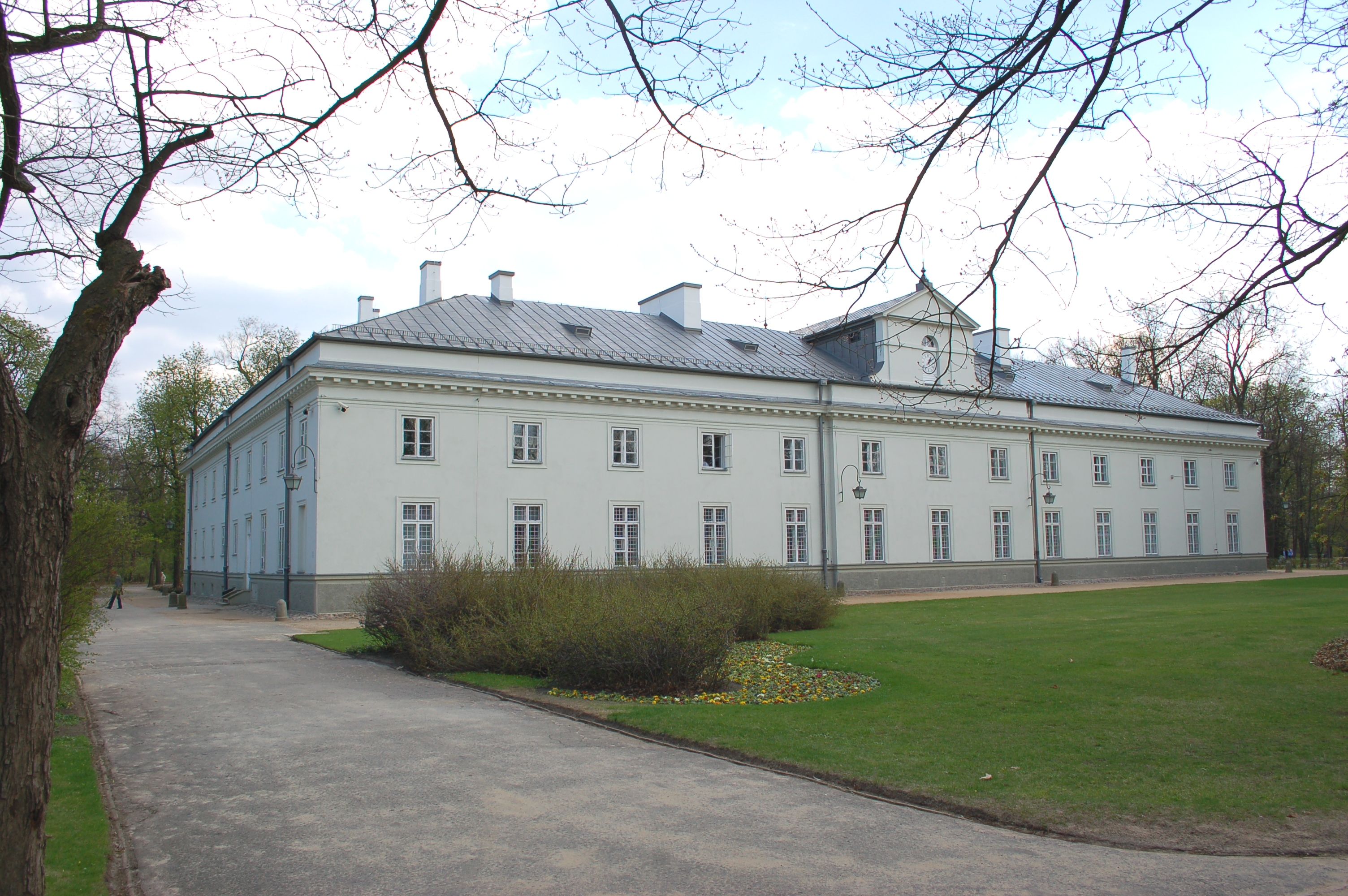 Lazienki Park, Warschau